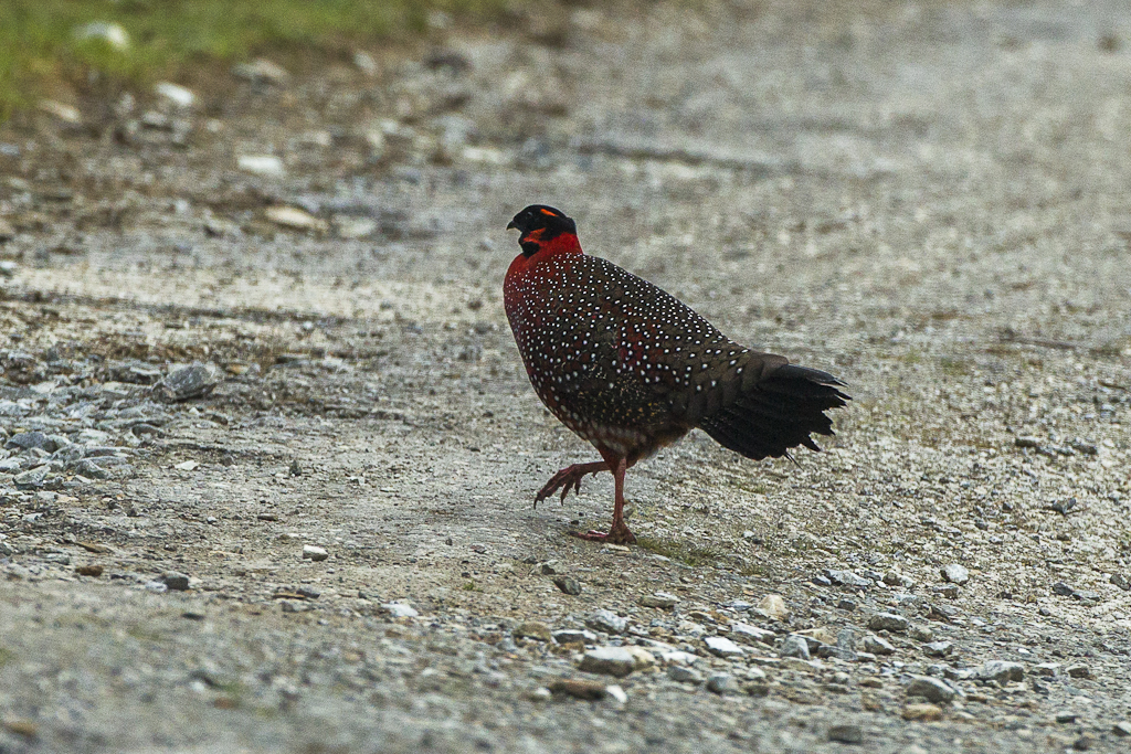 Satyr Tragopan - Bhutan_S4E9890